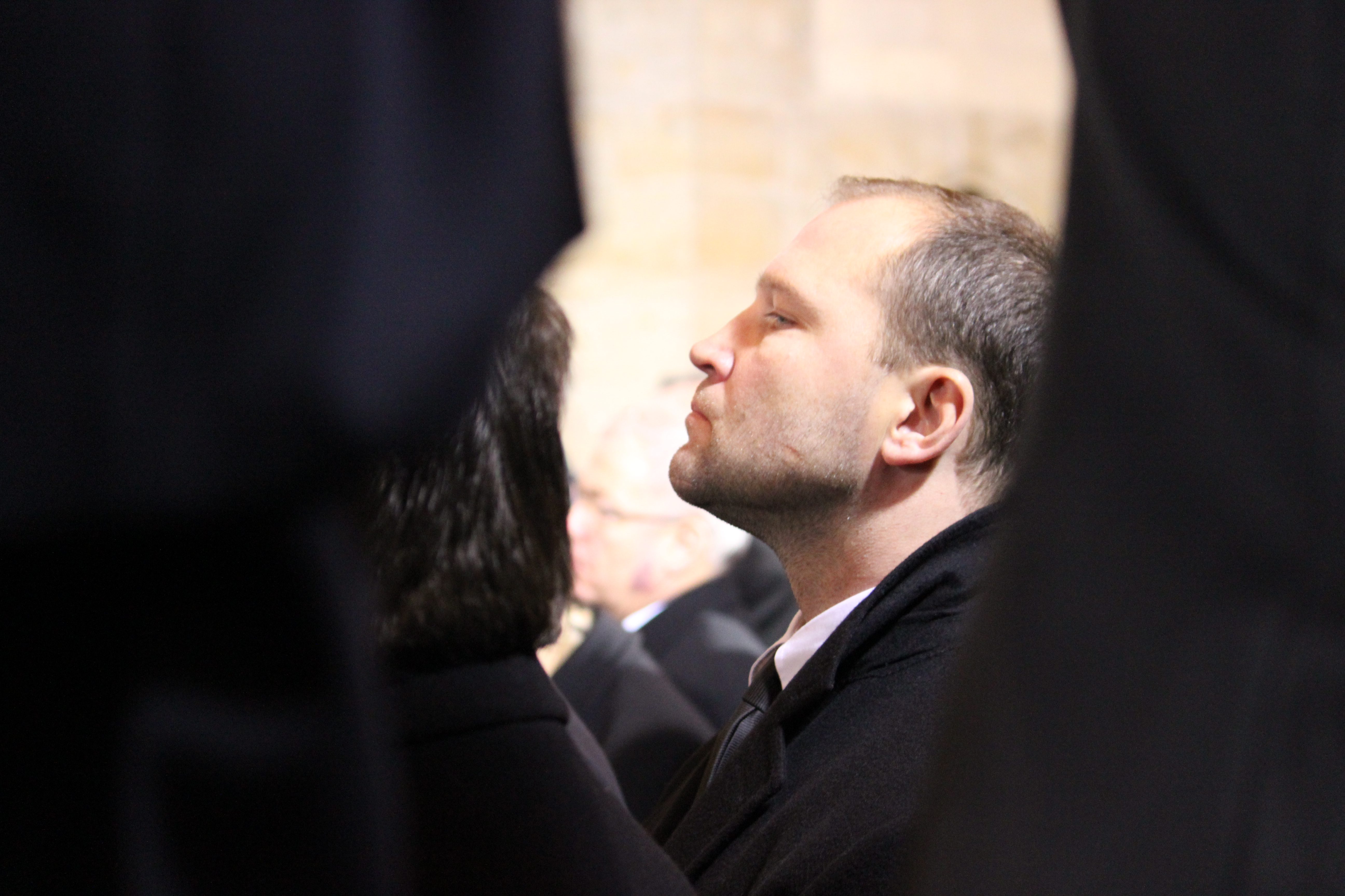 Ve středu 21. 12. 2011 byla rakev s ostatky Václava Havla přemístěna z Pražské křižovatky do Vladislavského sálu Pražského hradu. This photograph was taken with a DSLR from WMCZ's Camera grant.